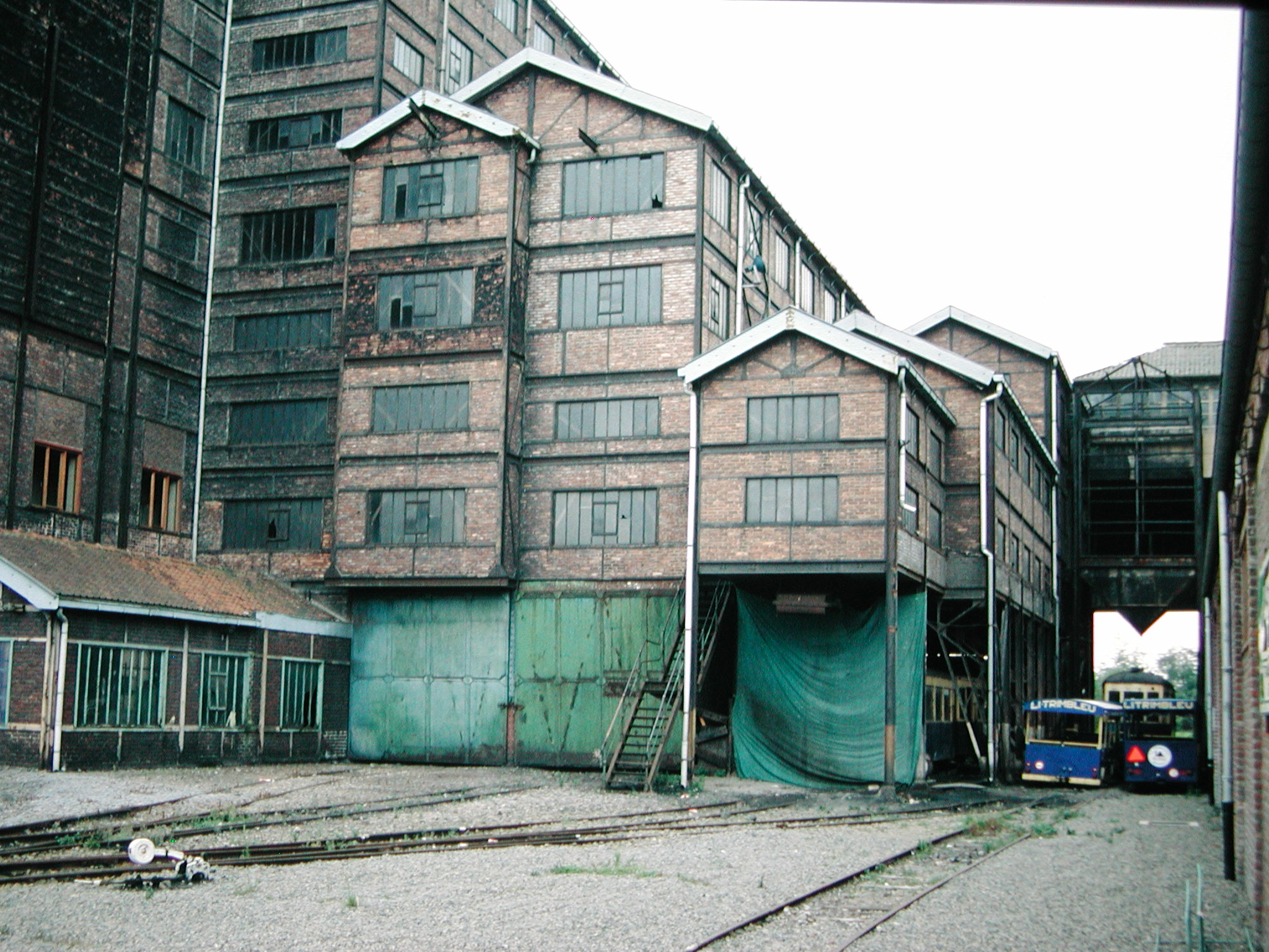 kolenmijn, Blegny Categorie:Wikipedia:Afbeeldingen/Gebruiker:P.H. Louw